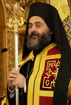 Ο Πανιερώτατος Μητροπολίτης Κηρύνειας κ.Χρυσόστομος - Metropolitan of Kιryneia mr Chrysostomos